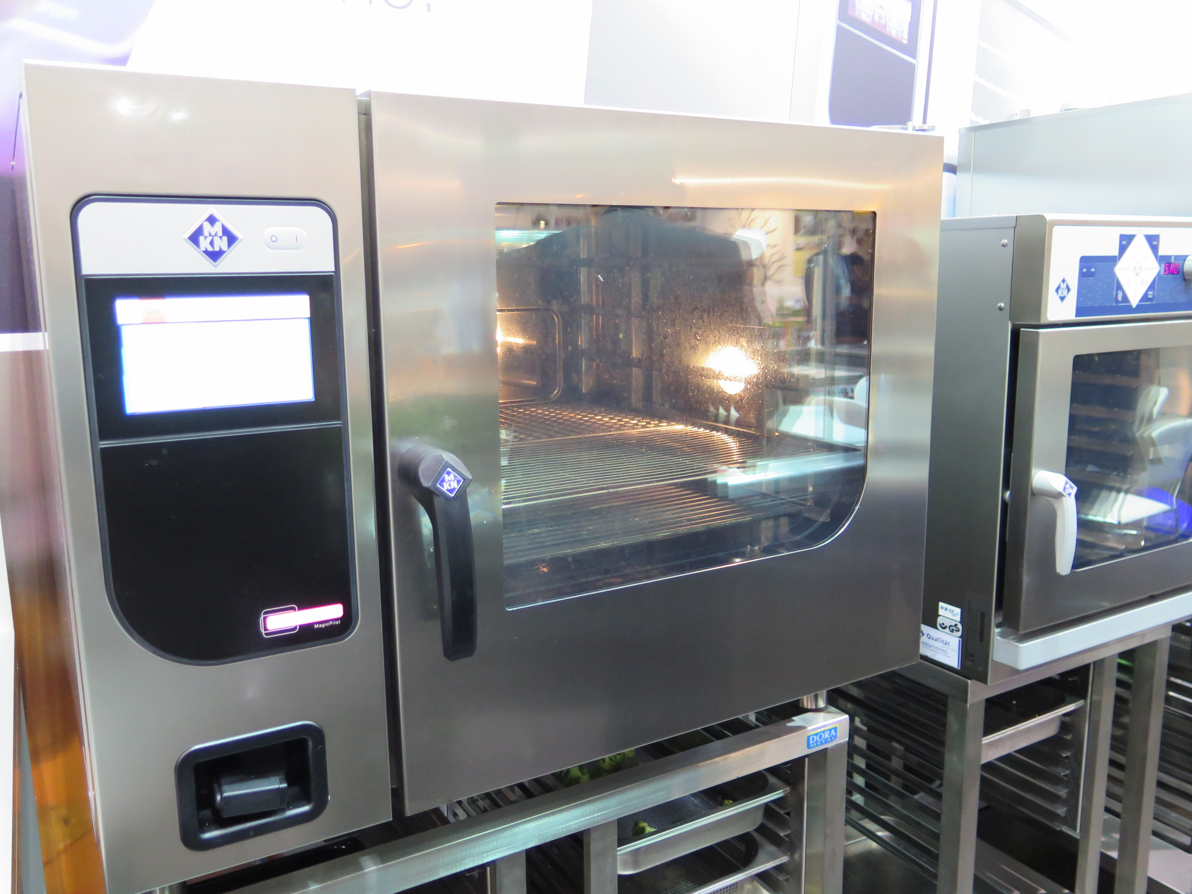 Piec konwekcyjno-parowy "MKN" podczas HORECA 2014 w Krakowie